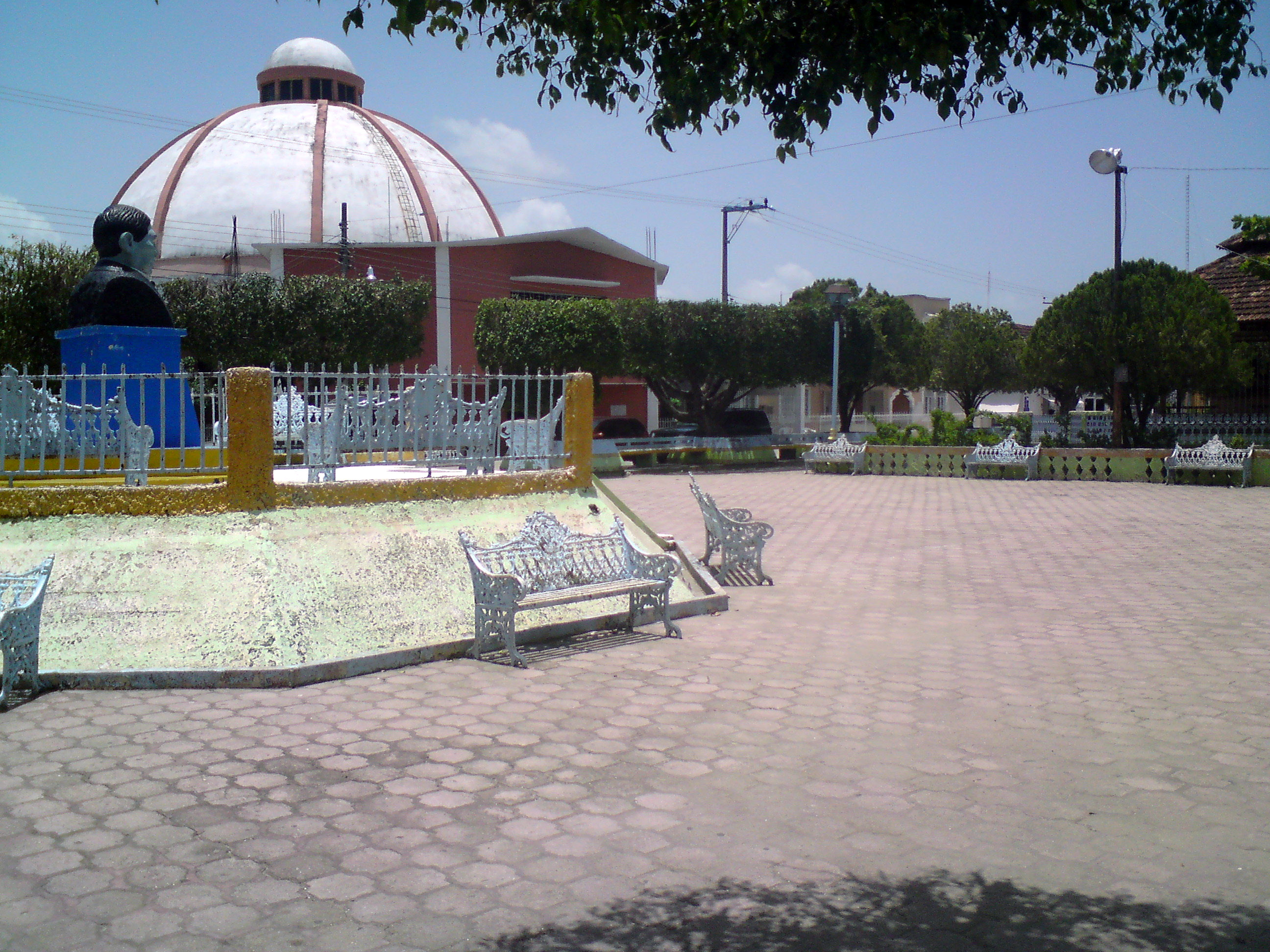 Parque Central de la ciudad de Jonuta, Tabasco; al fondo la iglesia principal de Jonuta